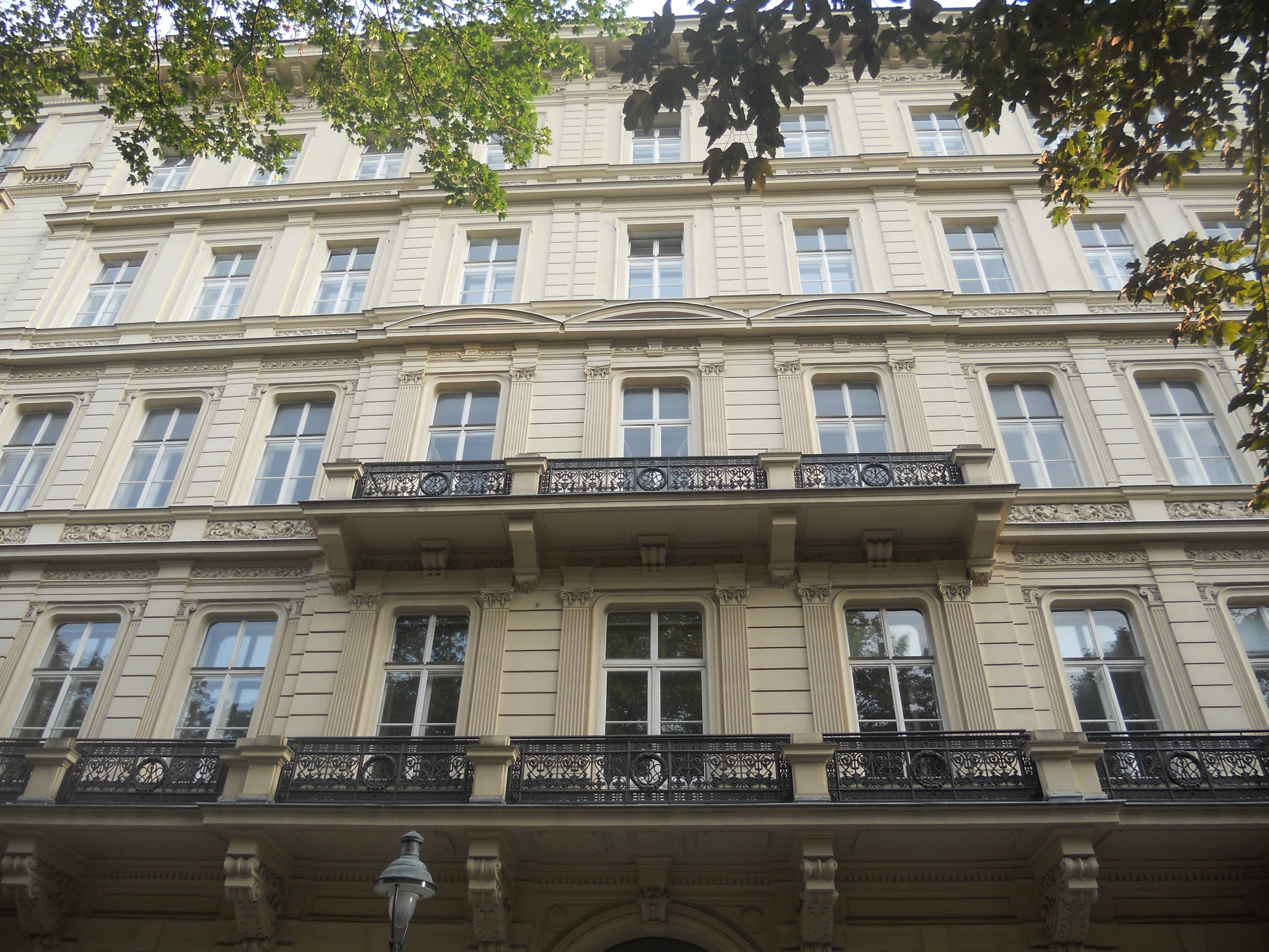 Haus Kärntner Ring 12 in Wien